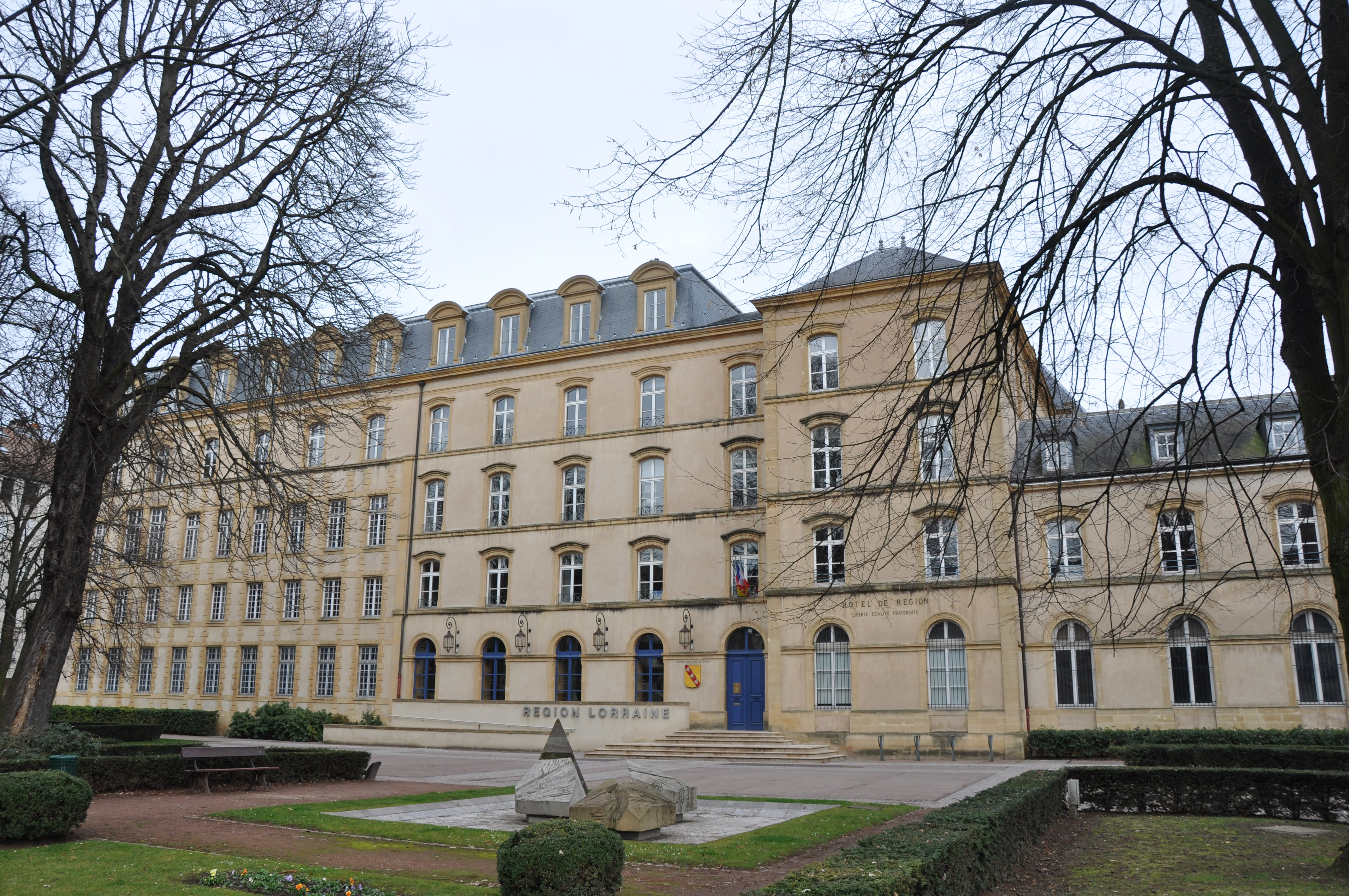 Region Lorraine, Metz, Lorraine, France